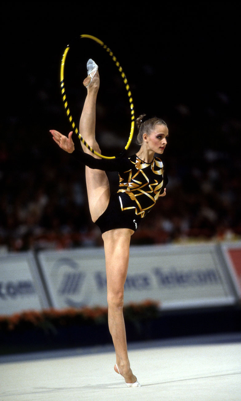 Olga Gontar Championnats de Monde GRS Paris-Bercy 1994